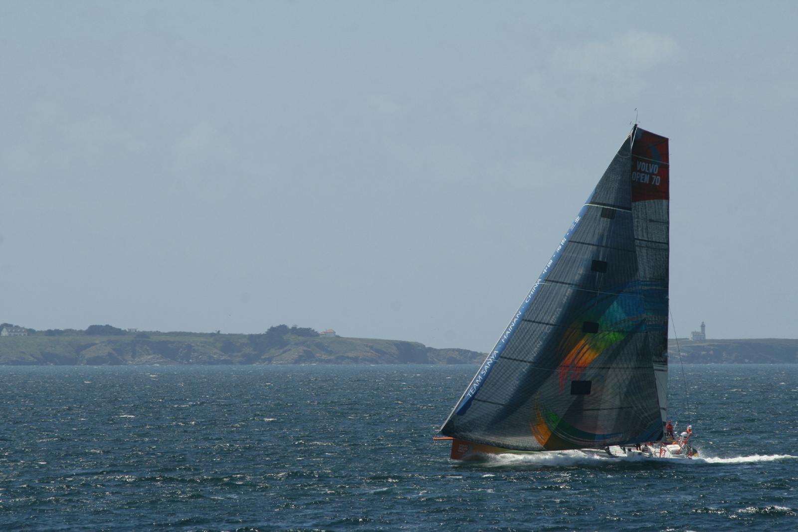 Team Sanya durant la Volvo Ocean Racedevant Belle-Ile